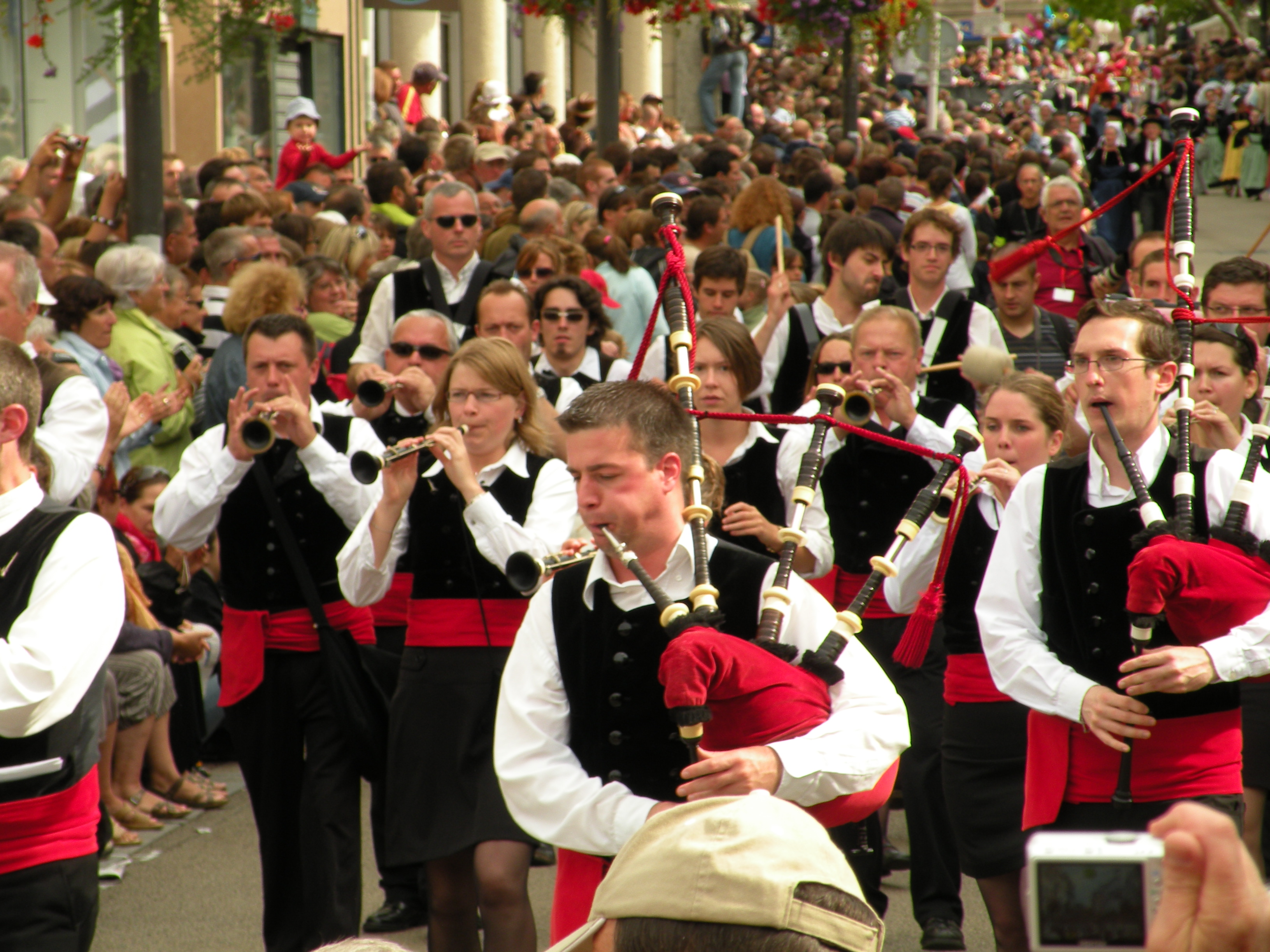 Le Bagad Bro Kemperle, lors du festival interceltique de Lorient 2009.